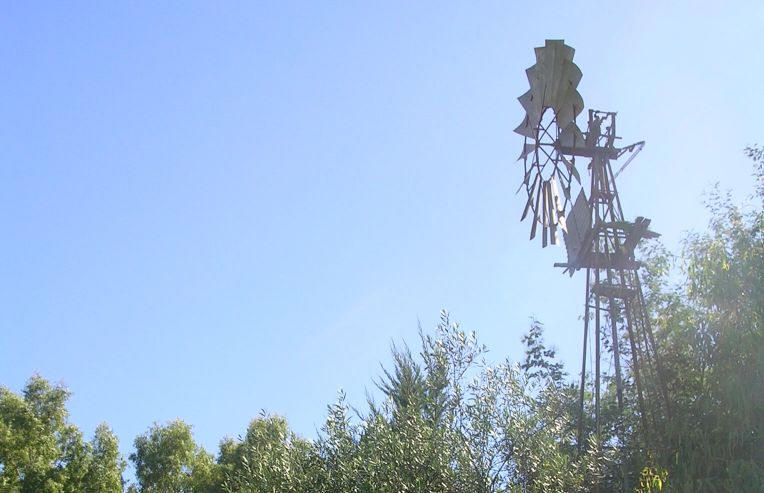 Molino de viento chileno